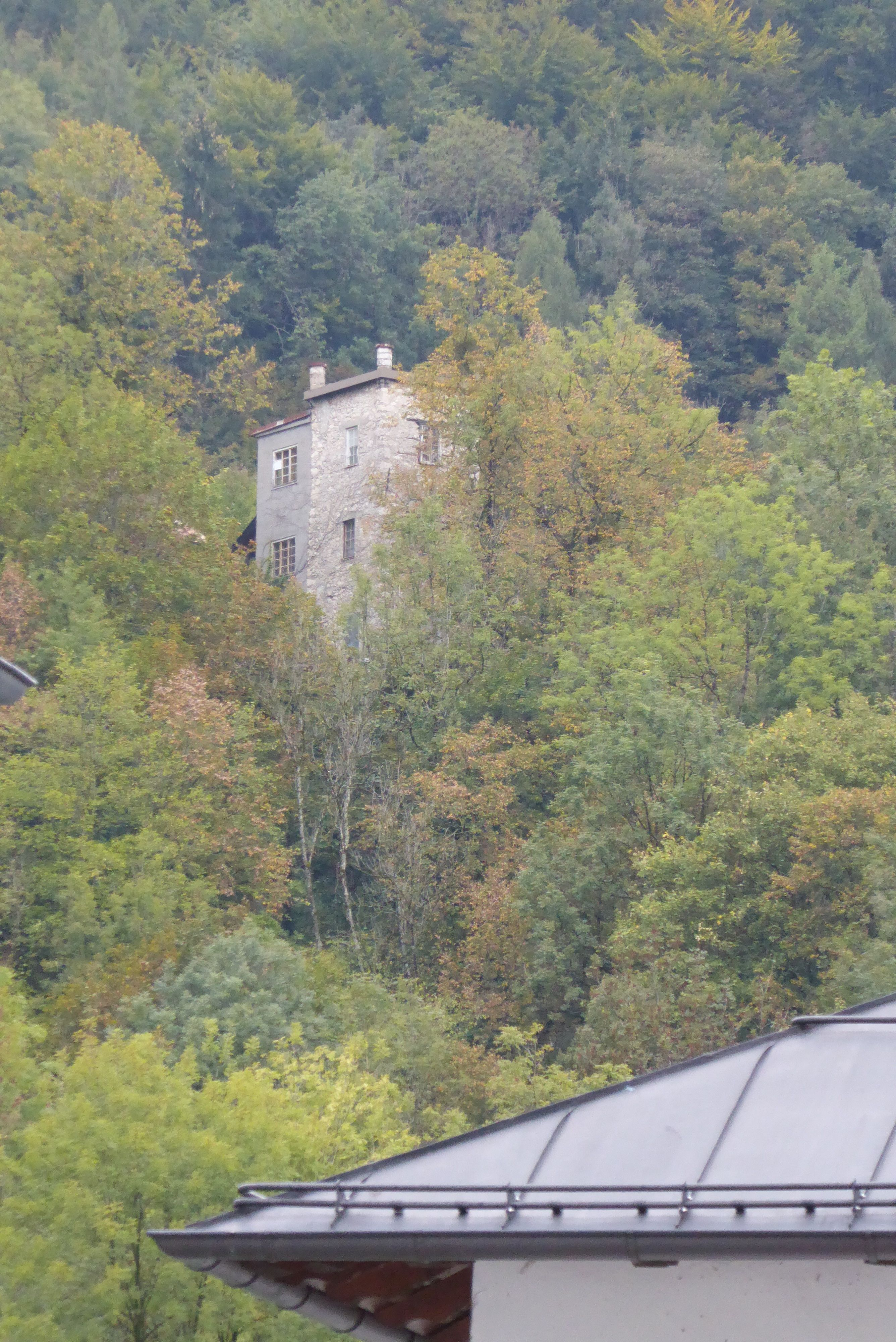 Der Reckturm von der Schützengasse aus gesehen.